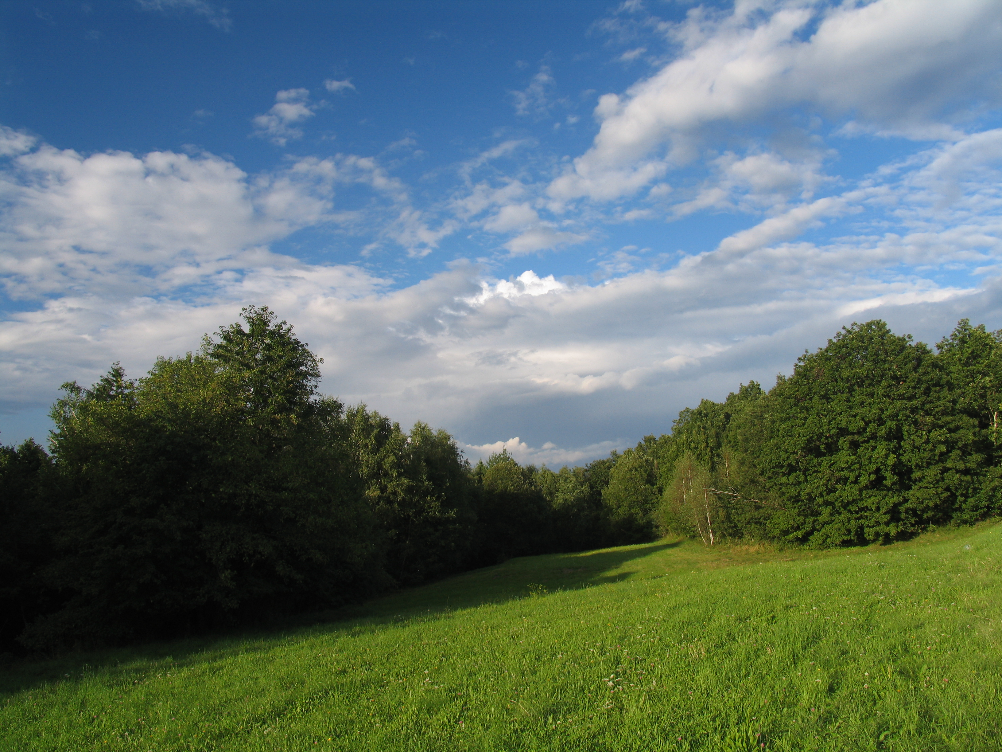 Mrse